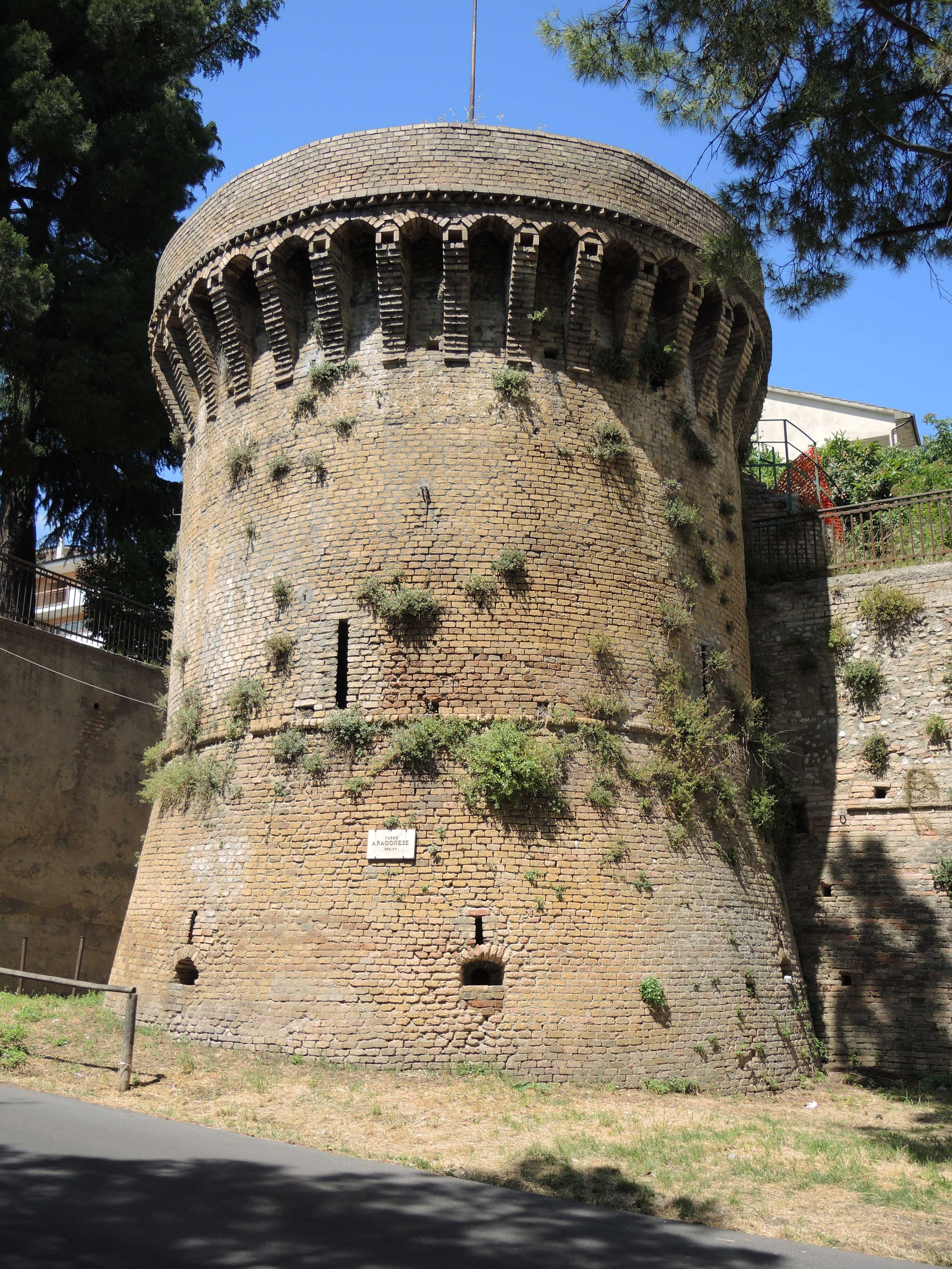 Lanciano - Torrione aragonese